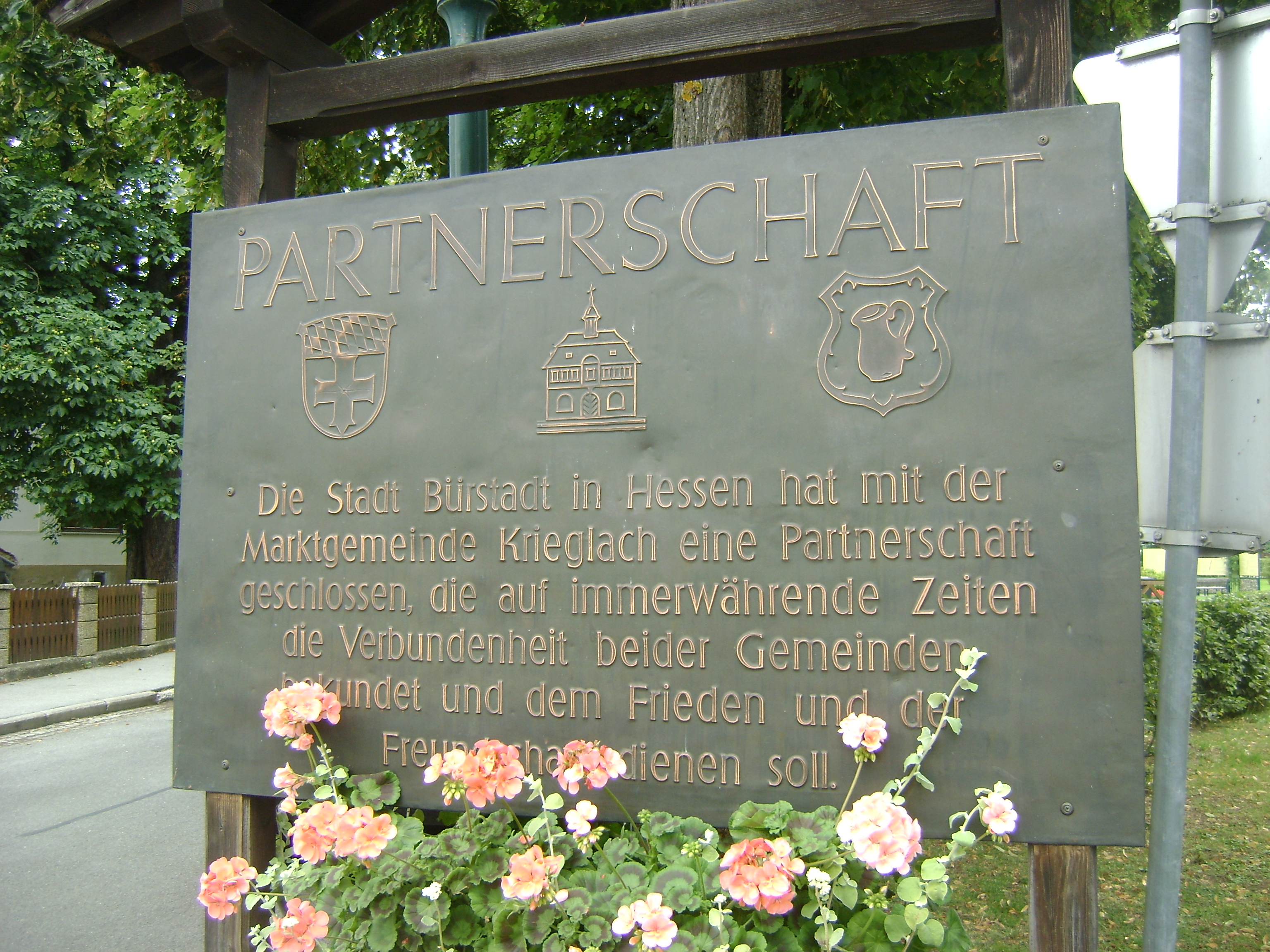 Schild, das die Partnerschaft zwischen Krieglach und Bürstadt bezeugen soll